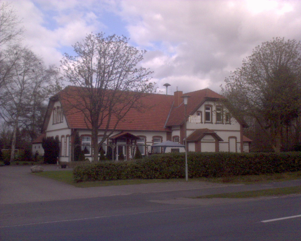 Die Alte Schule Dringenburg mit der Motorsirene der Feuerwehr Mollberg auf dem Dach; Wiefelstede.